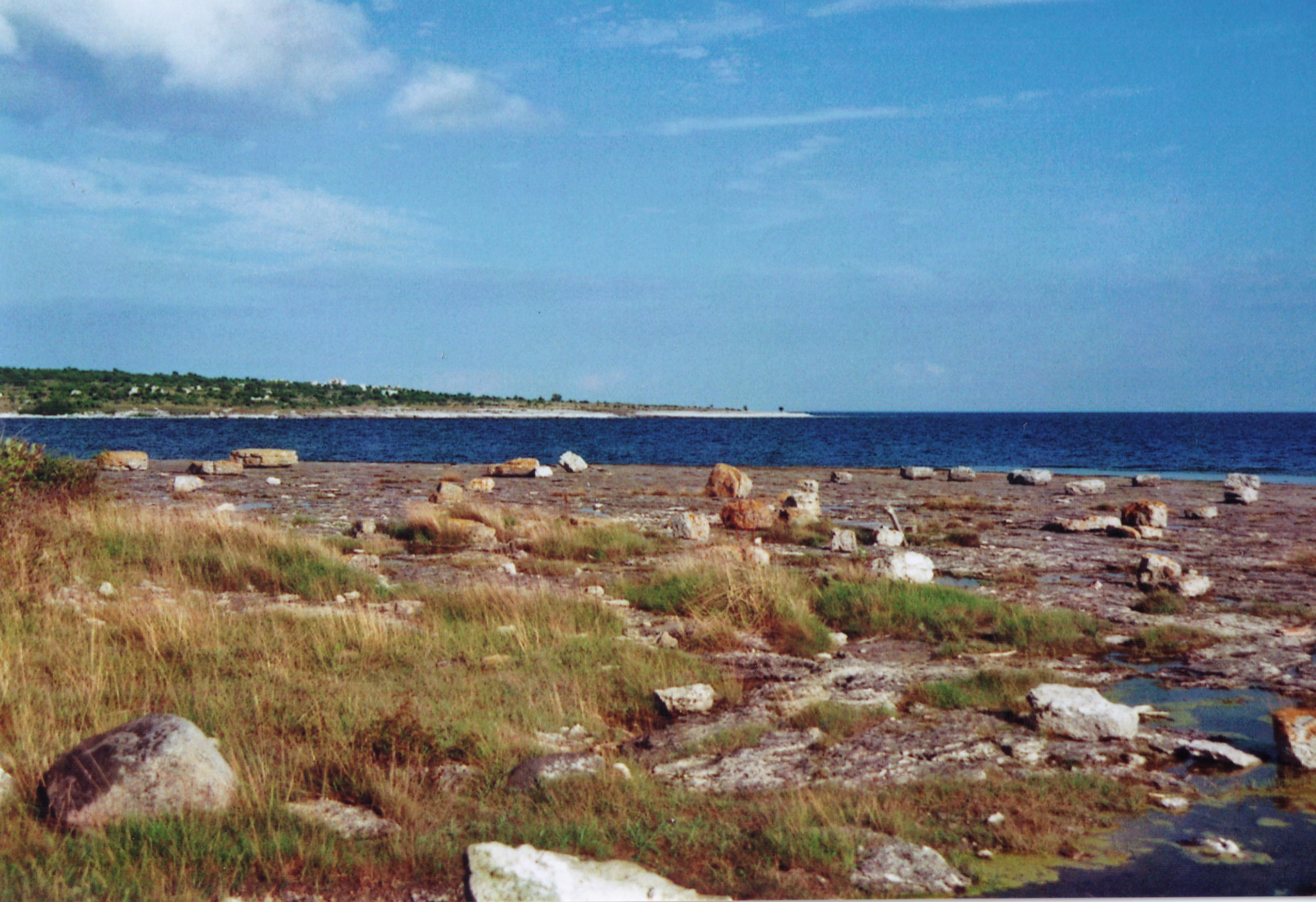 St Olofsholm, Gotland und Ytterholm